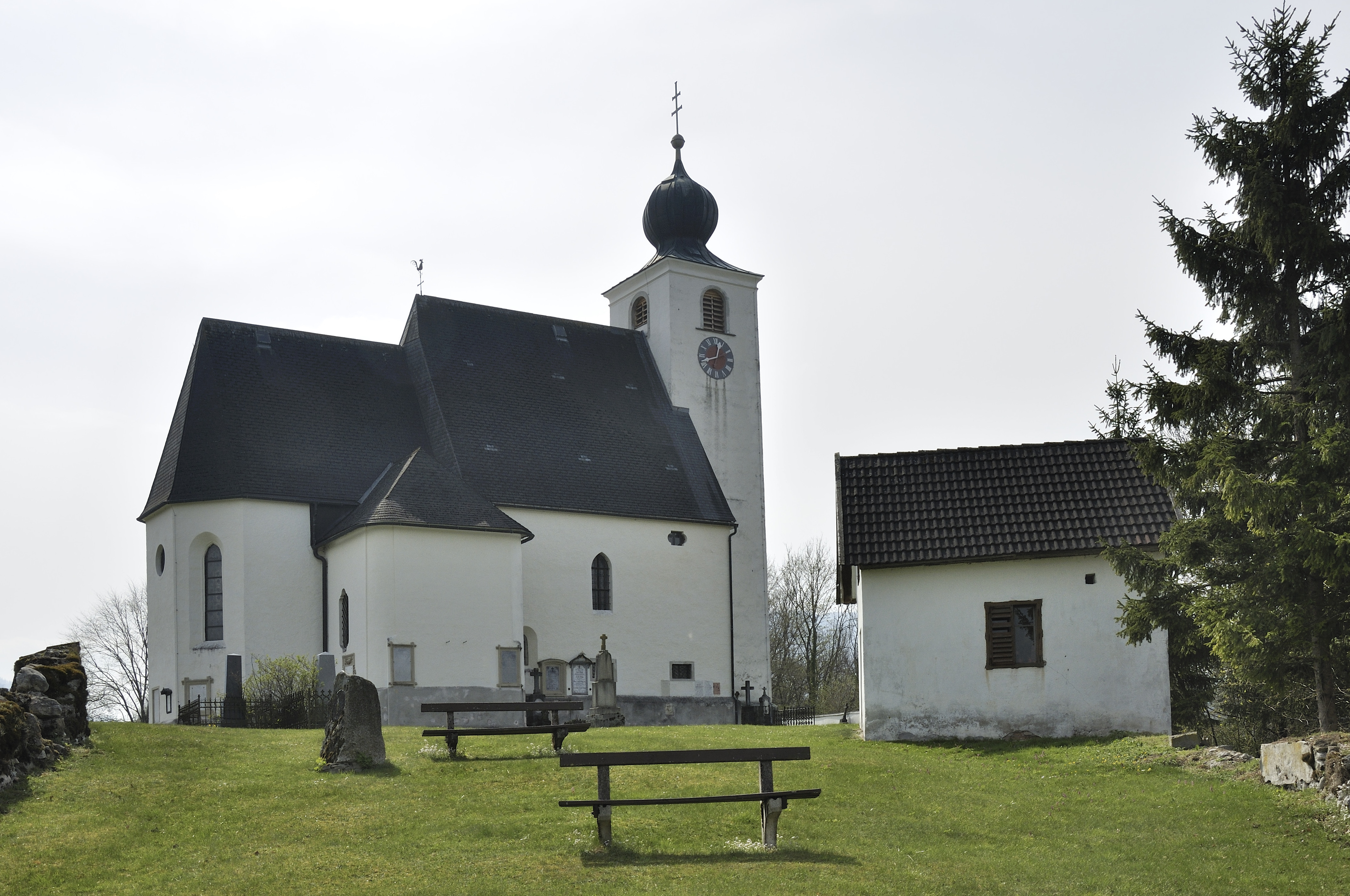 Kath. Pfarrkirche hl. Georg mit ehem. Friedhof